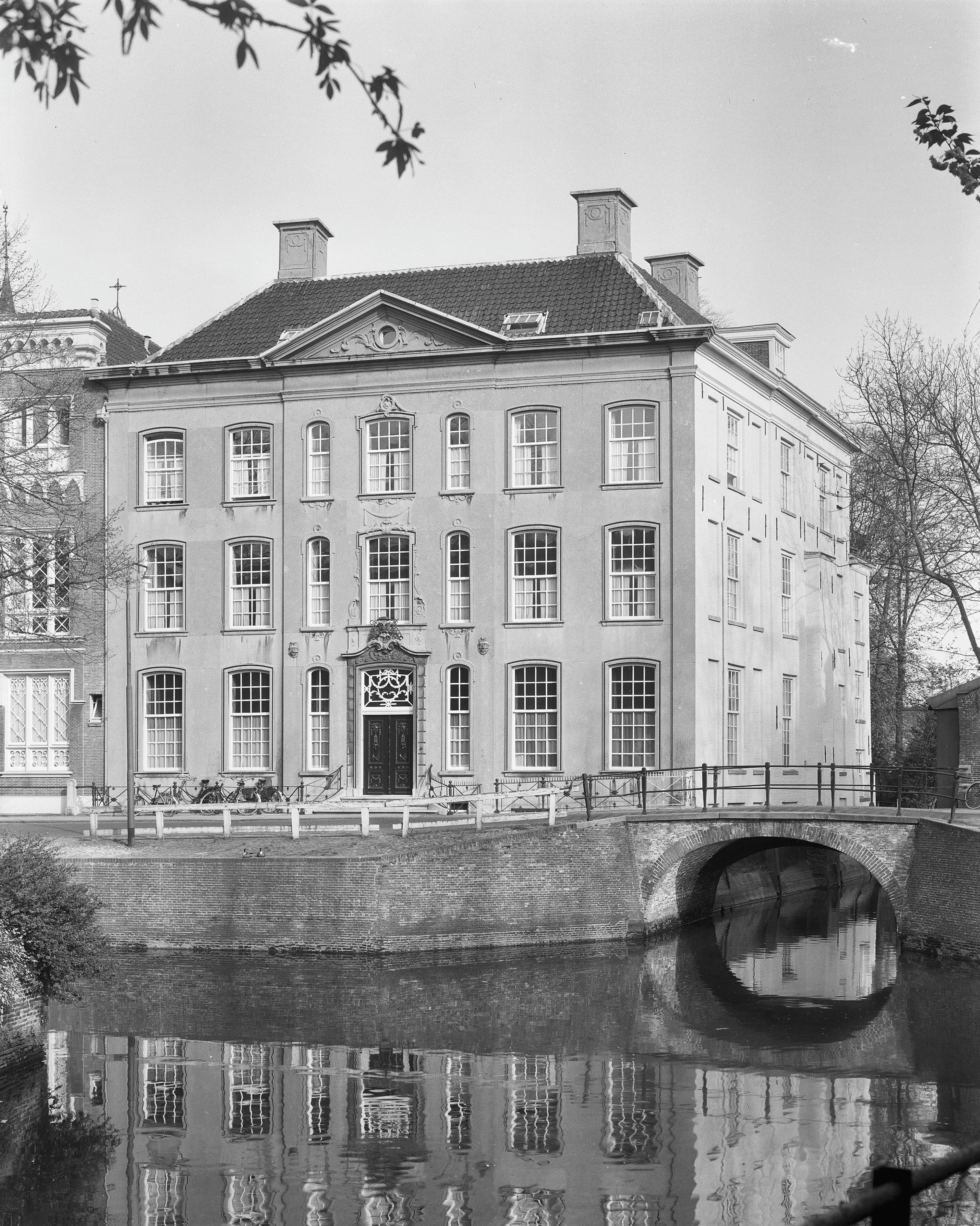 Huis Van Cohen: voorzijde